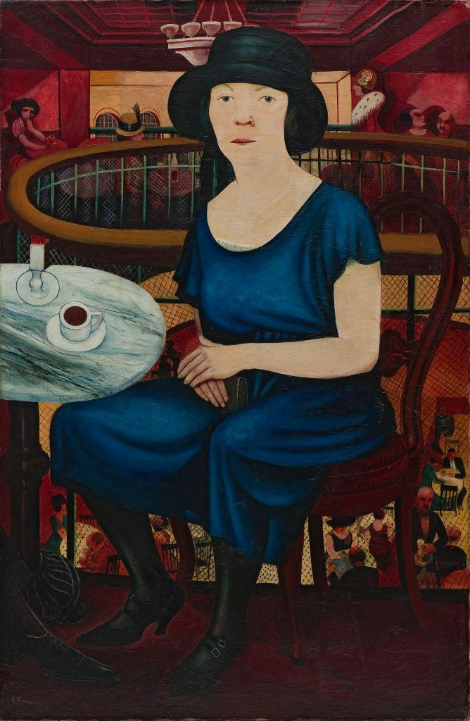 Titel: Mädchen im Café. Öl auf Leinwand. Maße: 1260 x 825 mm